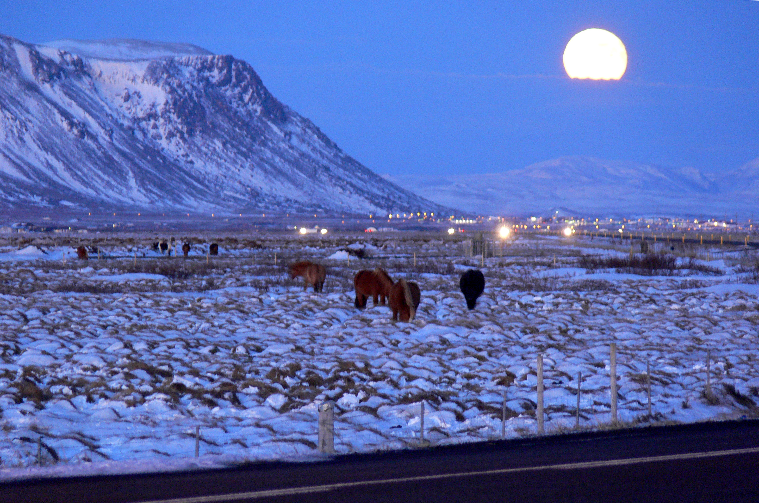 Vom Gaulverjabæjarvegur nach Selfoss. Links der Ingólfsfjall.